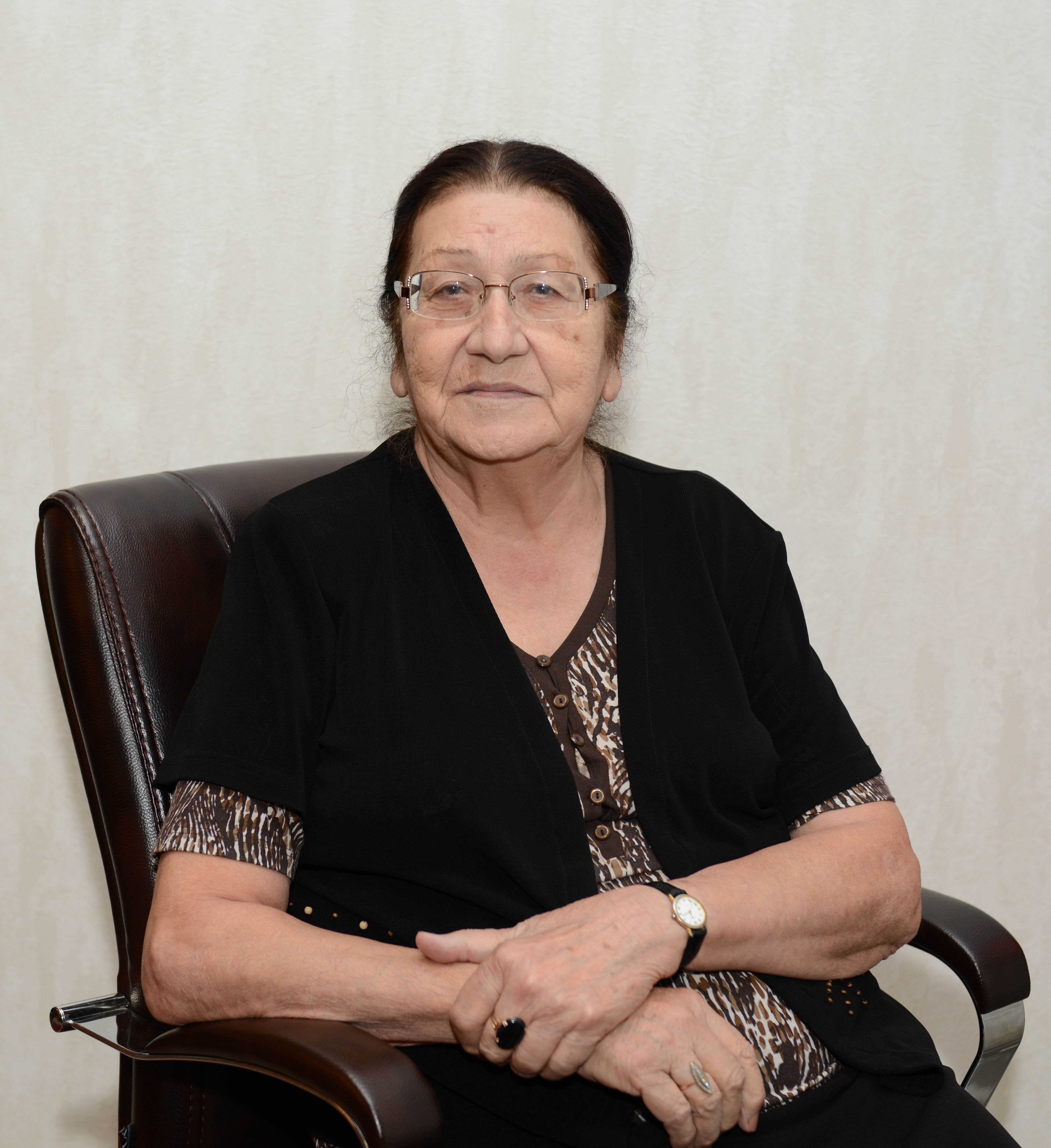 Fəzilə İbraqim qızı Səmədova (1929) — texnika elmləri doktoru, AMEA-nın müxbir üzvü, kimya üzrə mühəndis-texnoloq.